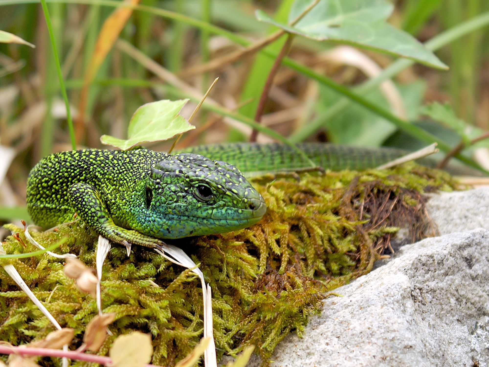 Lacerta bilineata